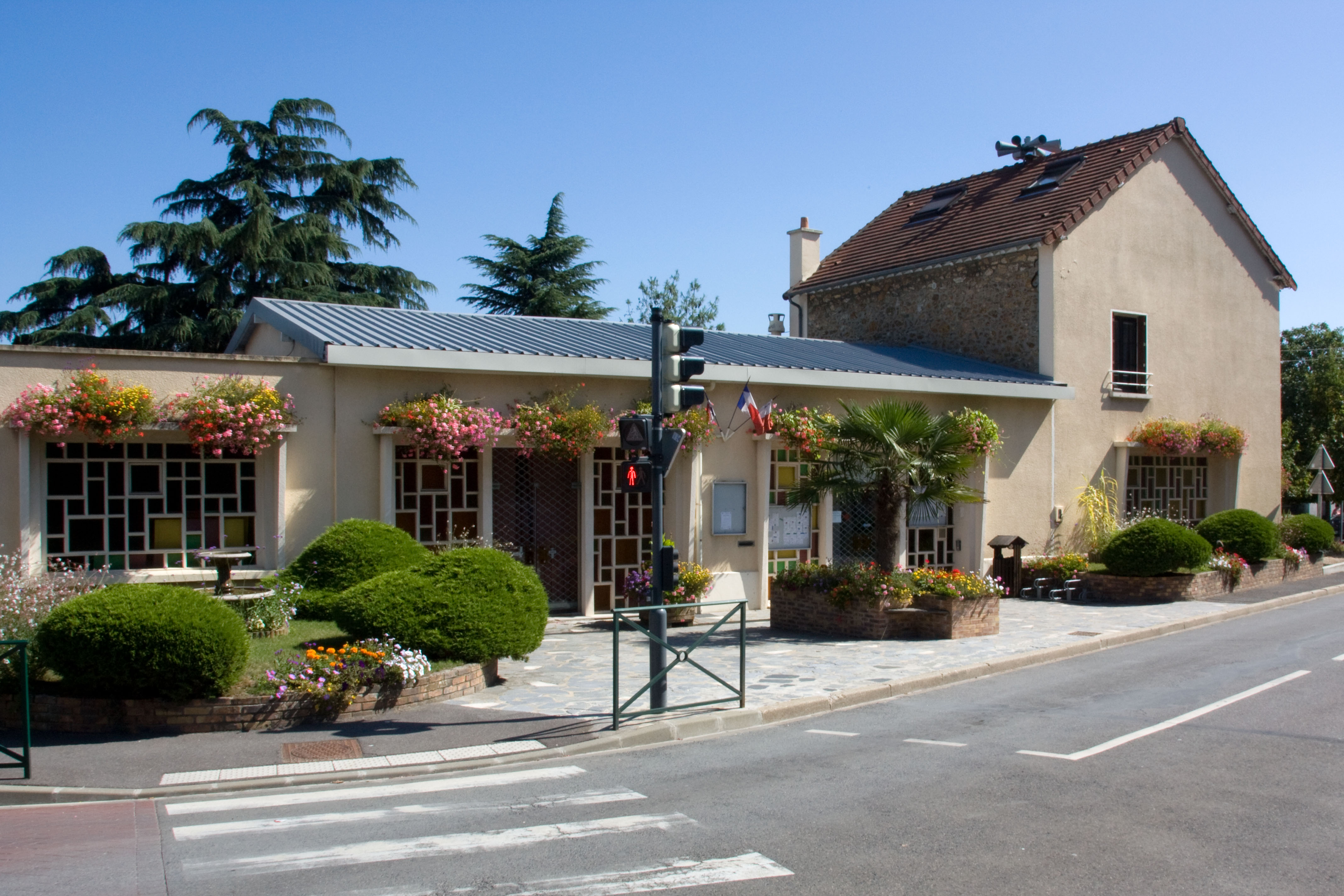 Mairie de Villabé, Villabé, Essonne, France.